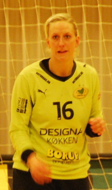 Den danske håndboldspiller Christina Pedersen.